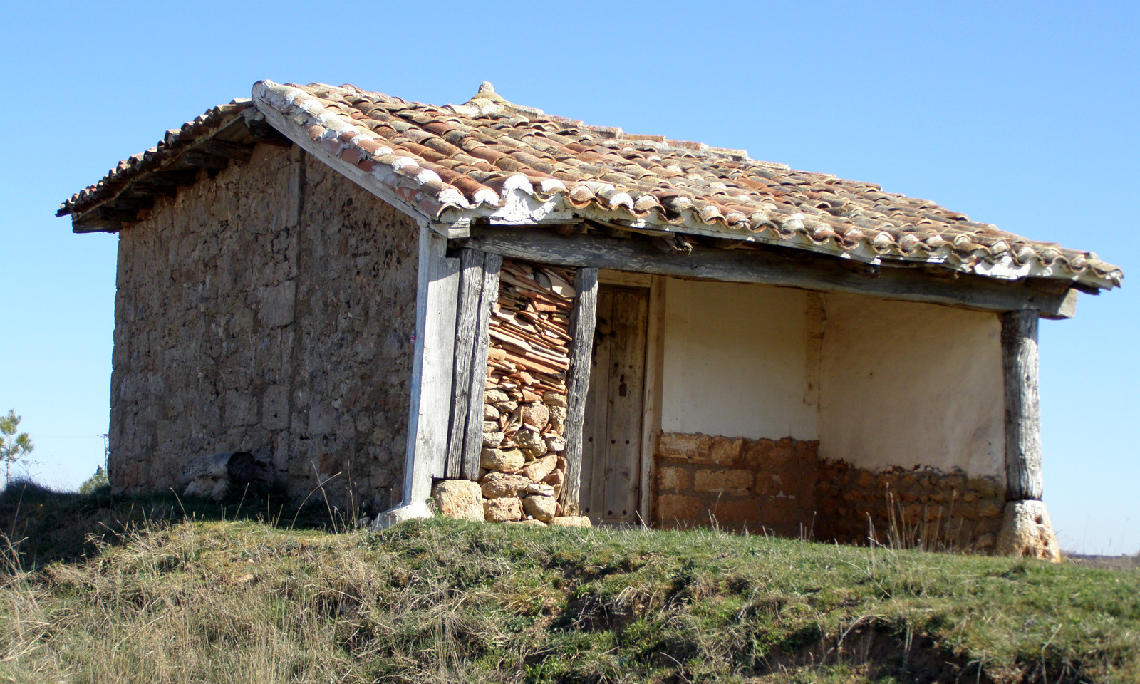 Ermita de San Roque en Quintanilla de Riofresno (Burgos) - España